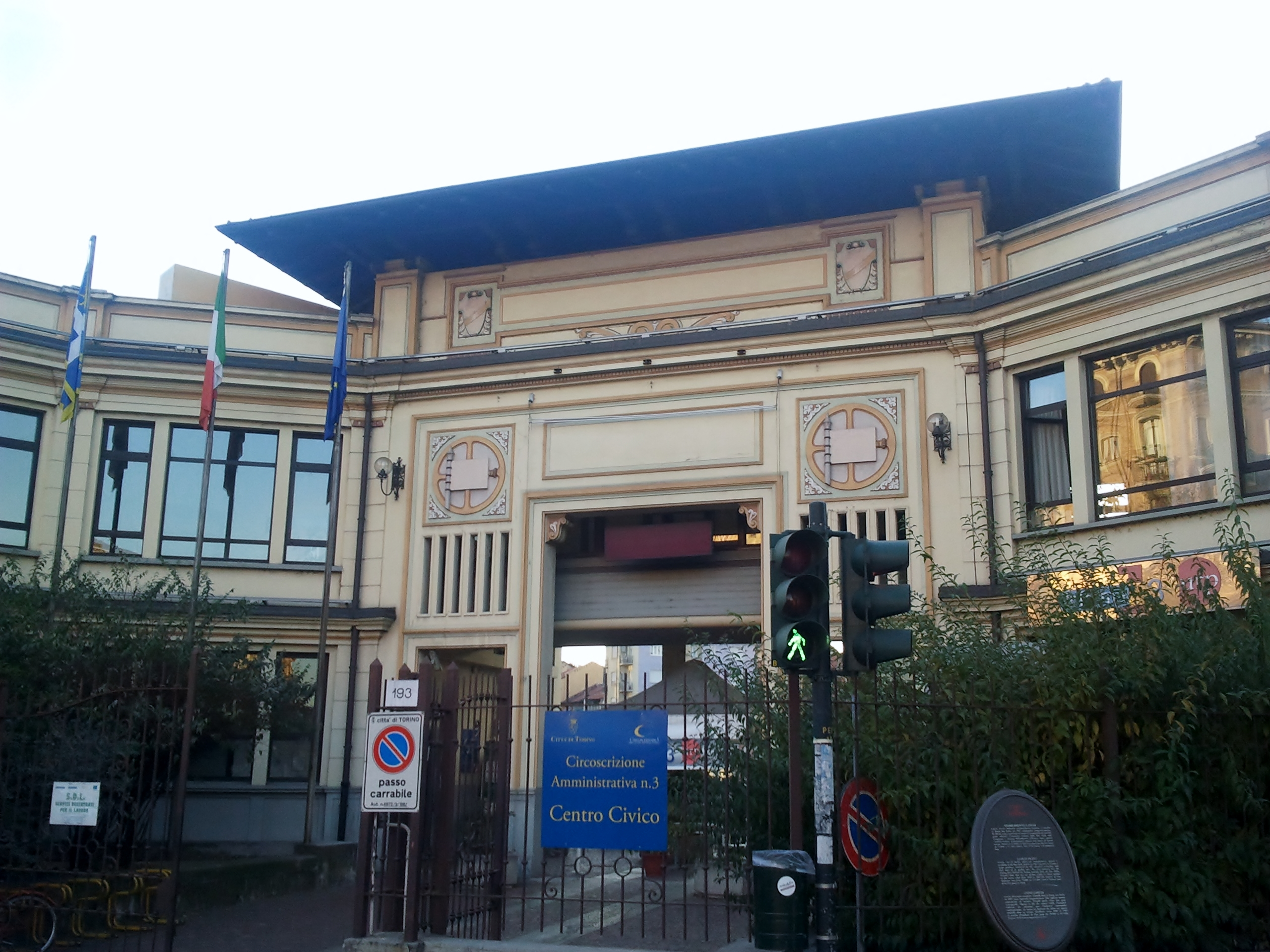 ex Lancia Borgo San Paolo. Torino. Italy